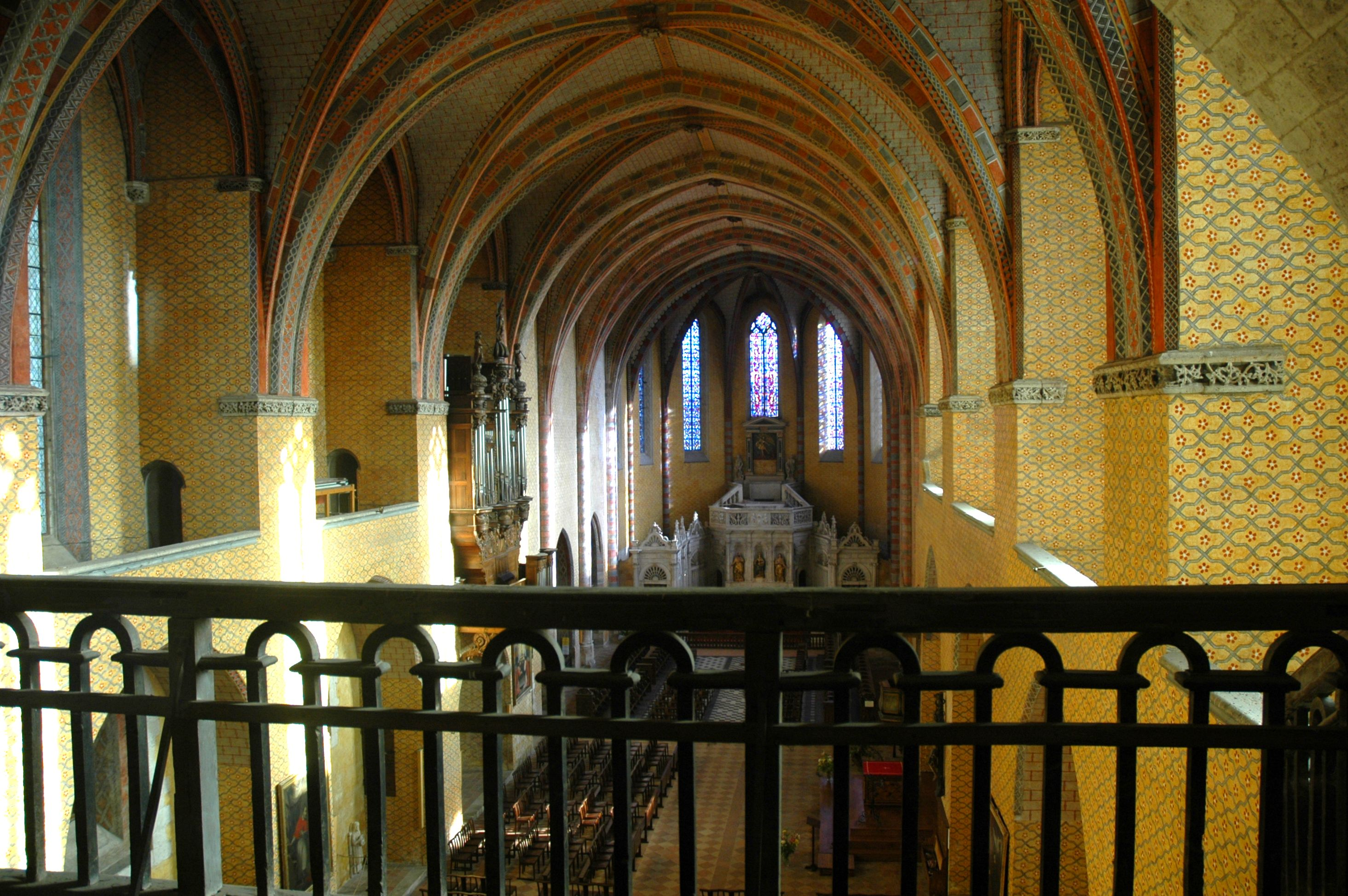 Abadia de Saint-Pierre de Moissac - Interior església